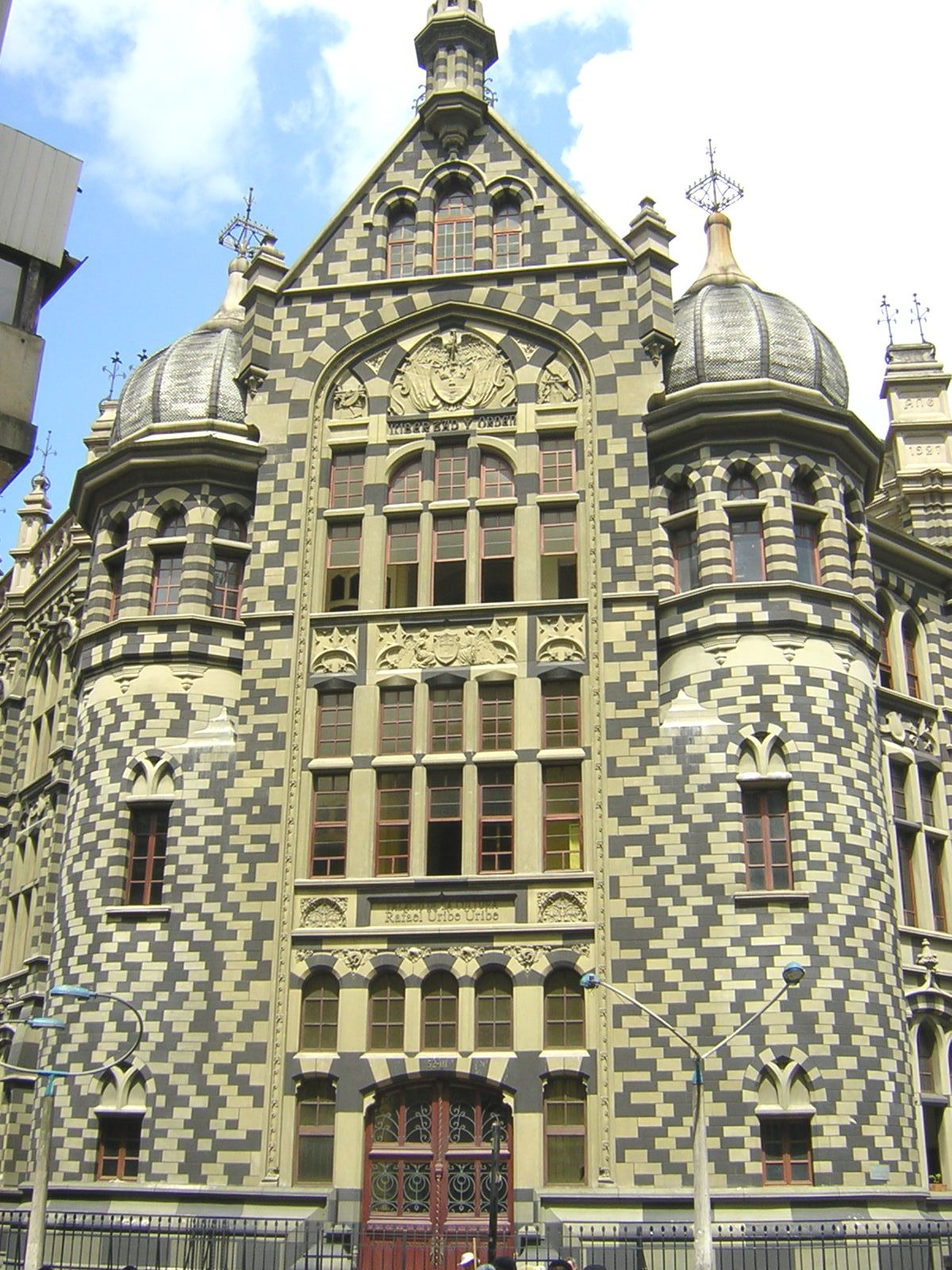 Palacio de la Cultura Rafael Uribe Uribe, Fachada del edificio. Medellín, Colombia